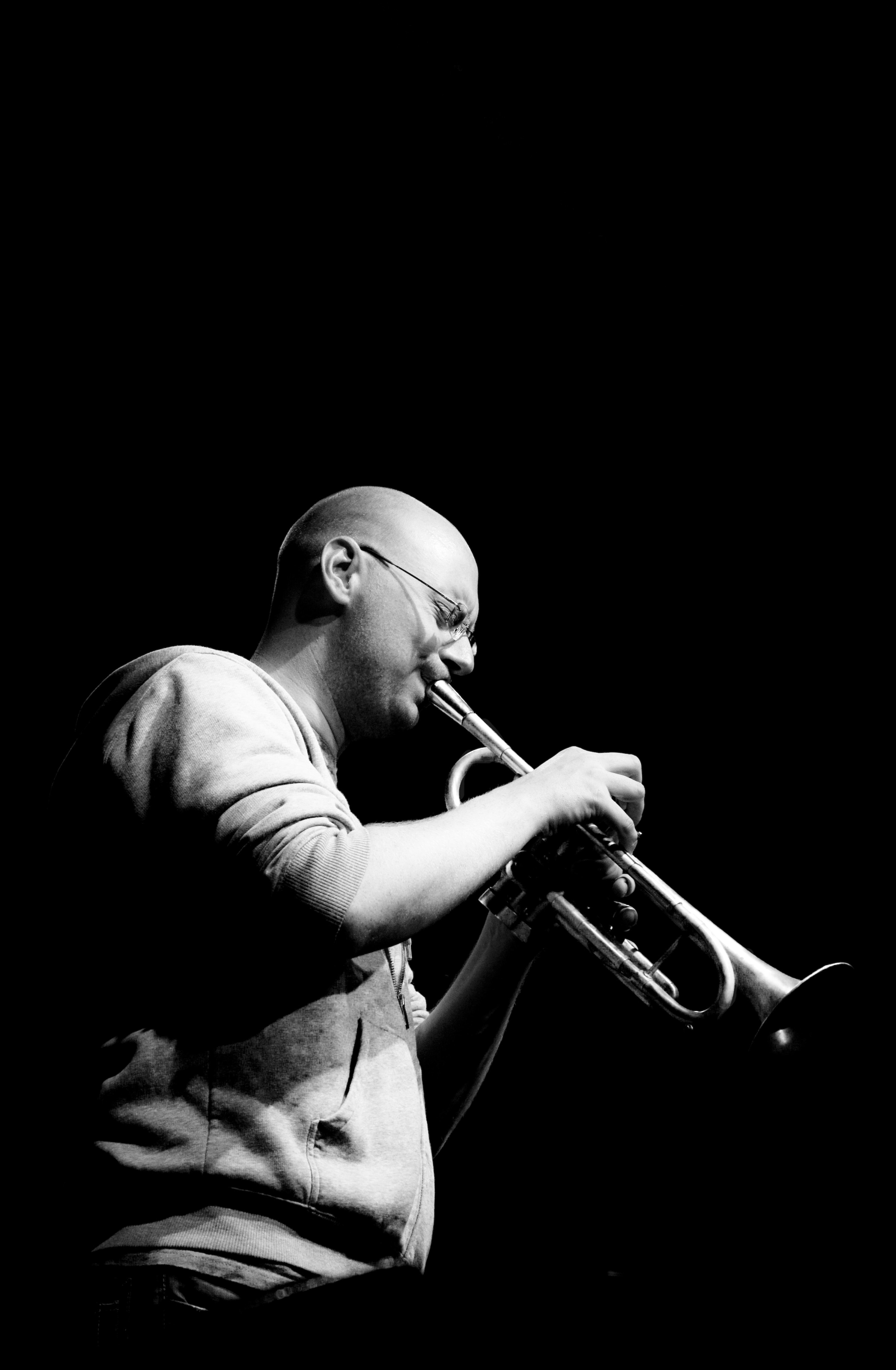 Tore Johansen - pressefoto.